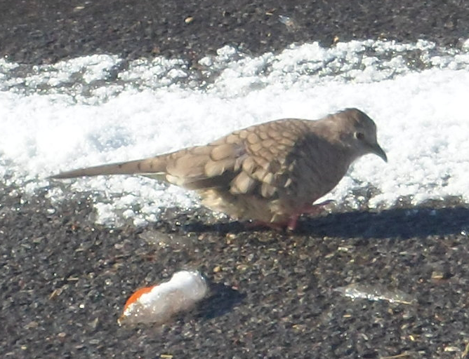 Columbina inca (Tortolita mexicana) buscando alimento en una calle en la ciudad de Chihuahua, durante un día nevado.